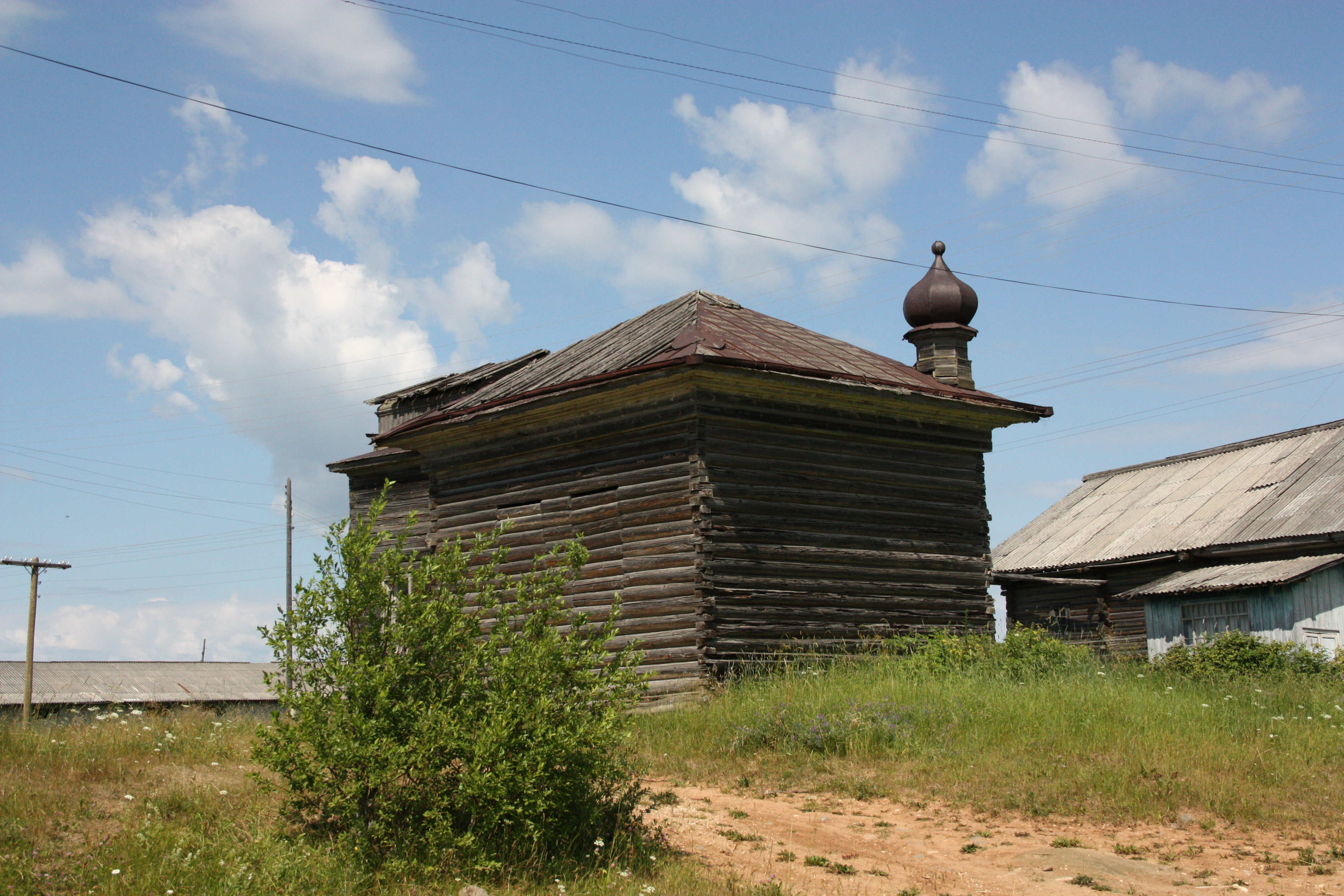 Успенская часовня: Елюга (Хозьминский с/с), Вельский район, Архангельская область